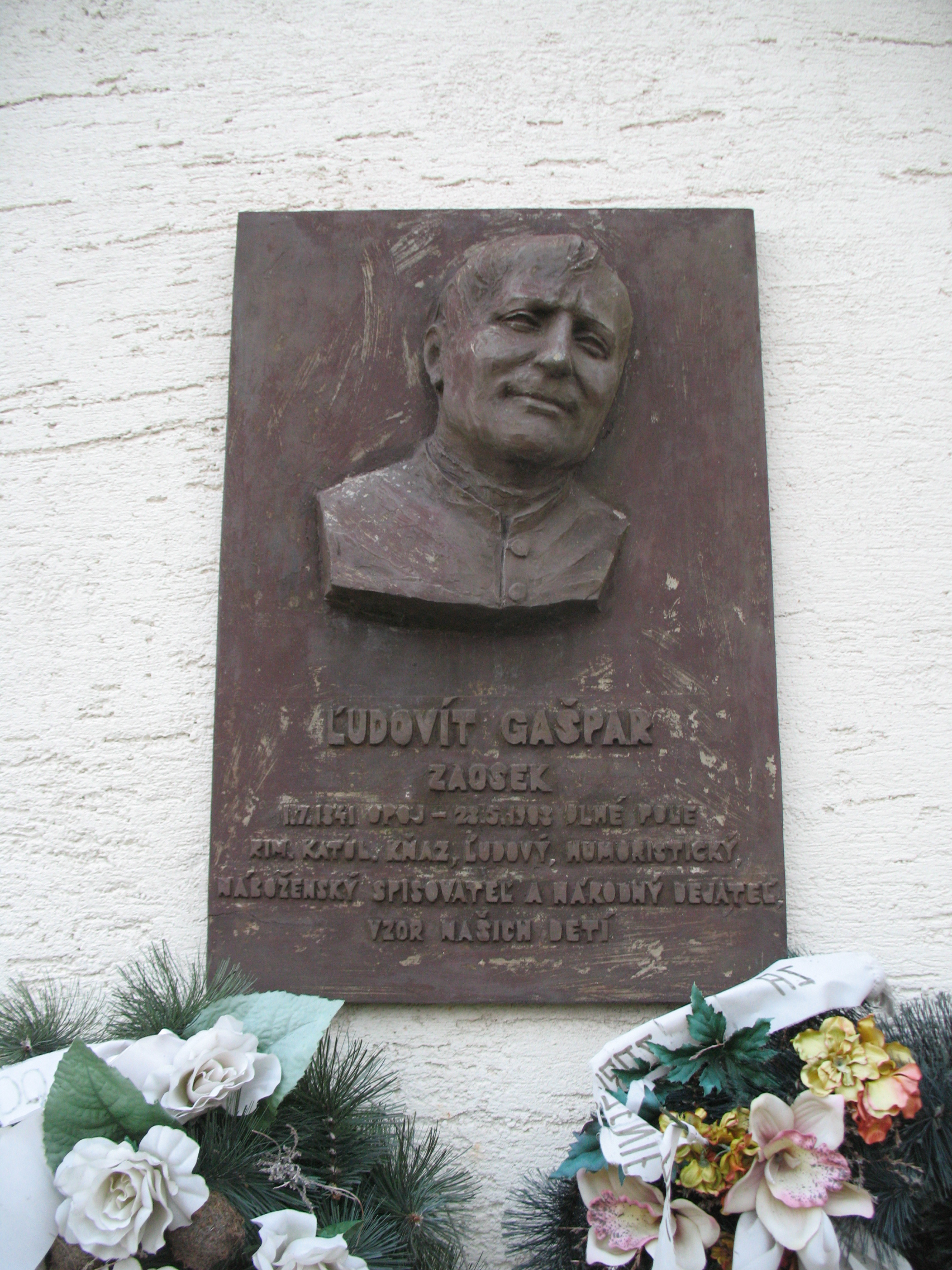 Apaj Opoj